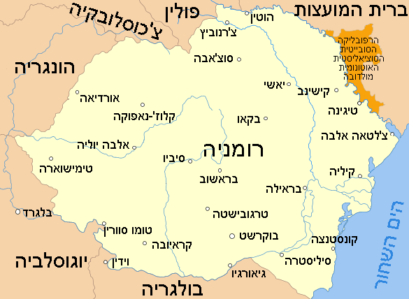 Romania MASSR 1920